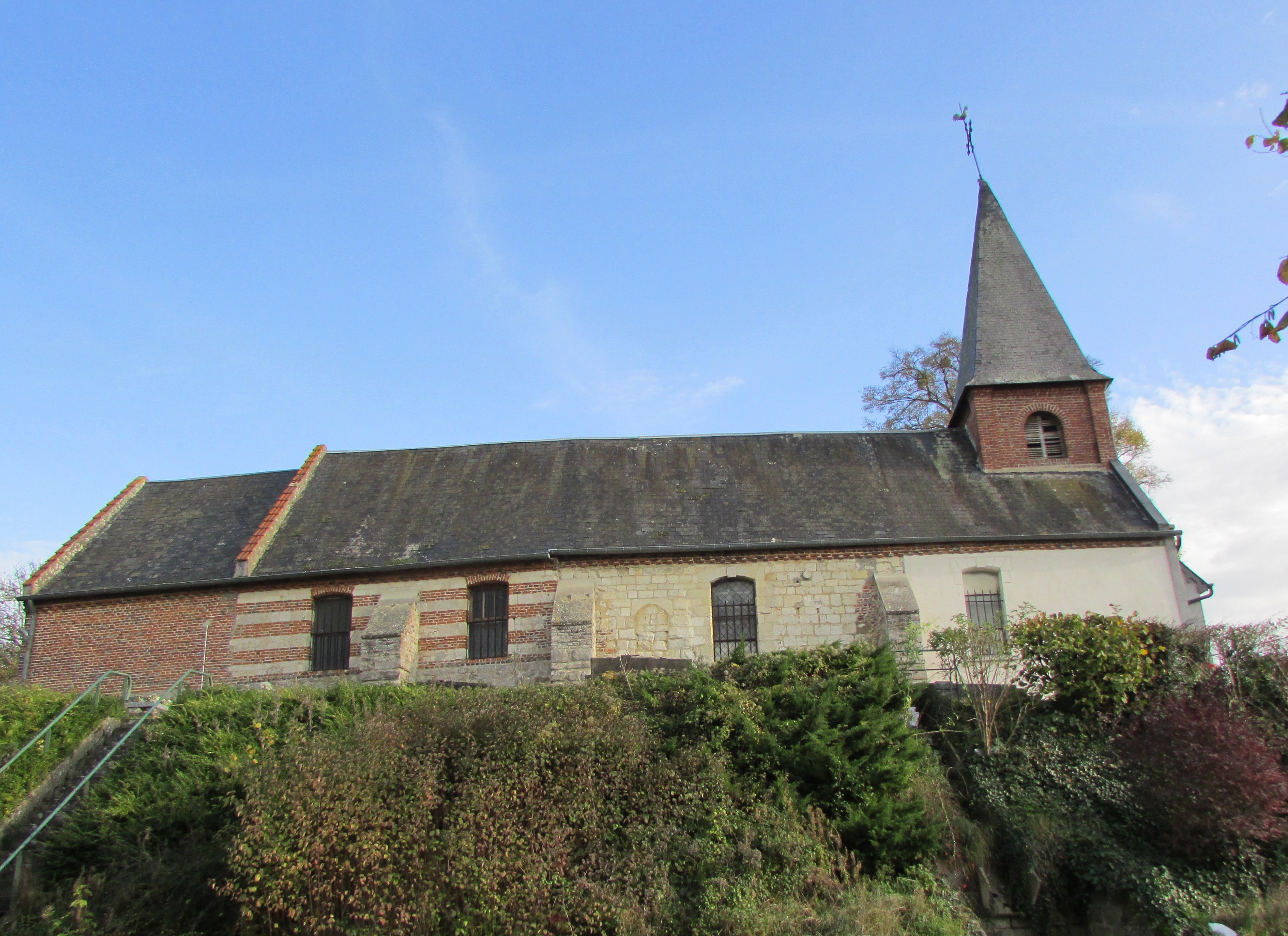 L'église de Proix.